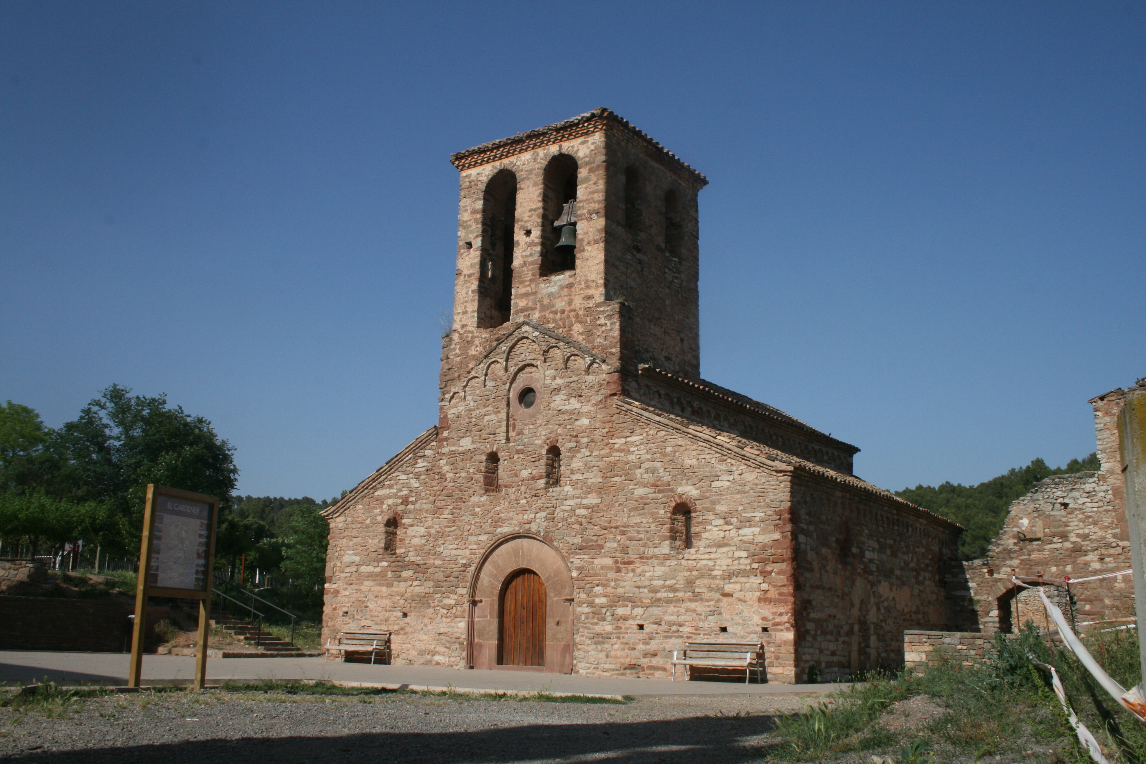 església de Castellnou de Bages. Façana